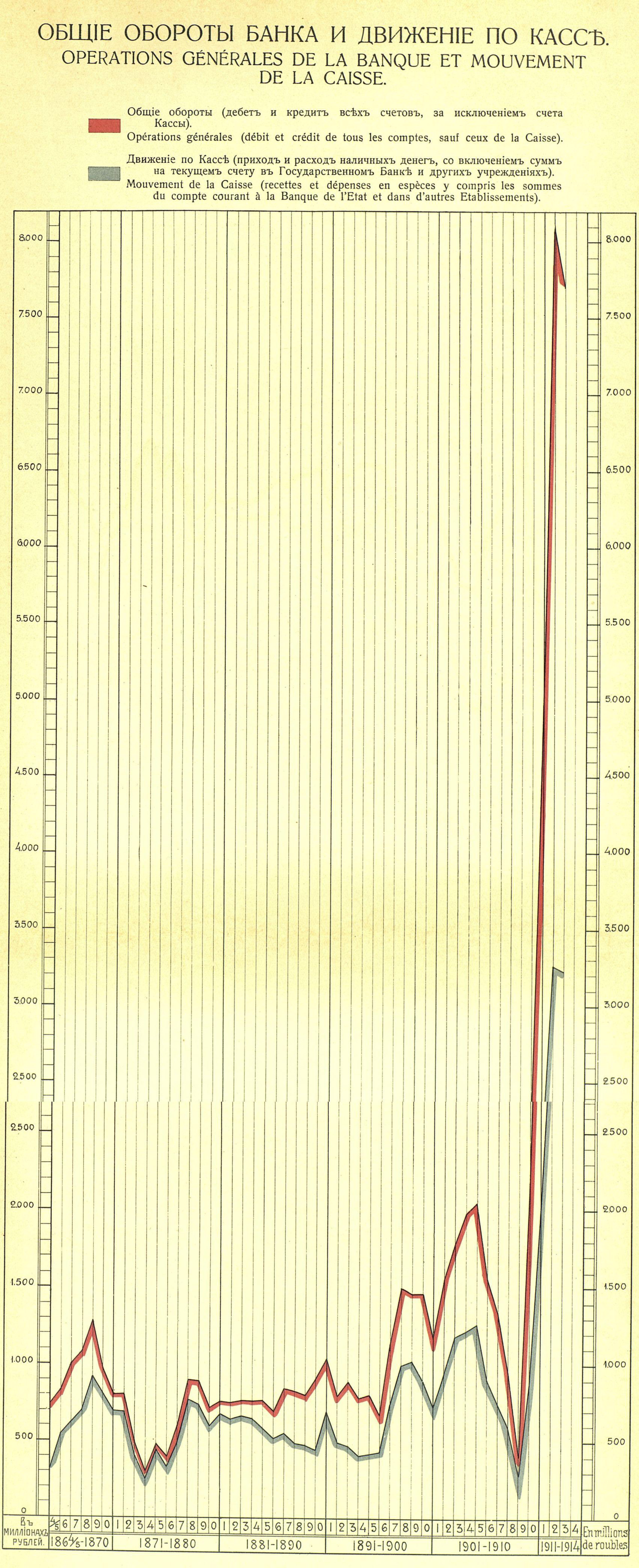 Общие обороты Санкт-Петербургского частного коммерческого банка, 1864-1914